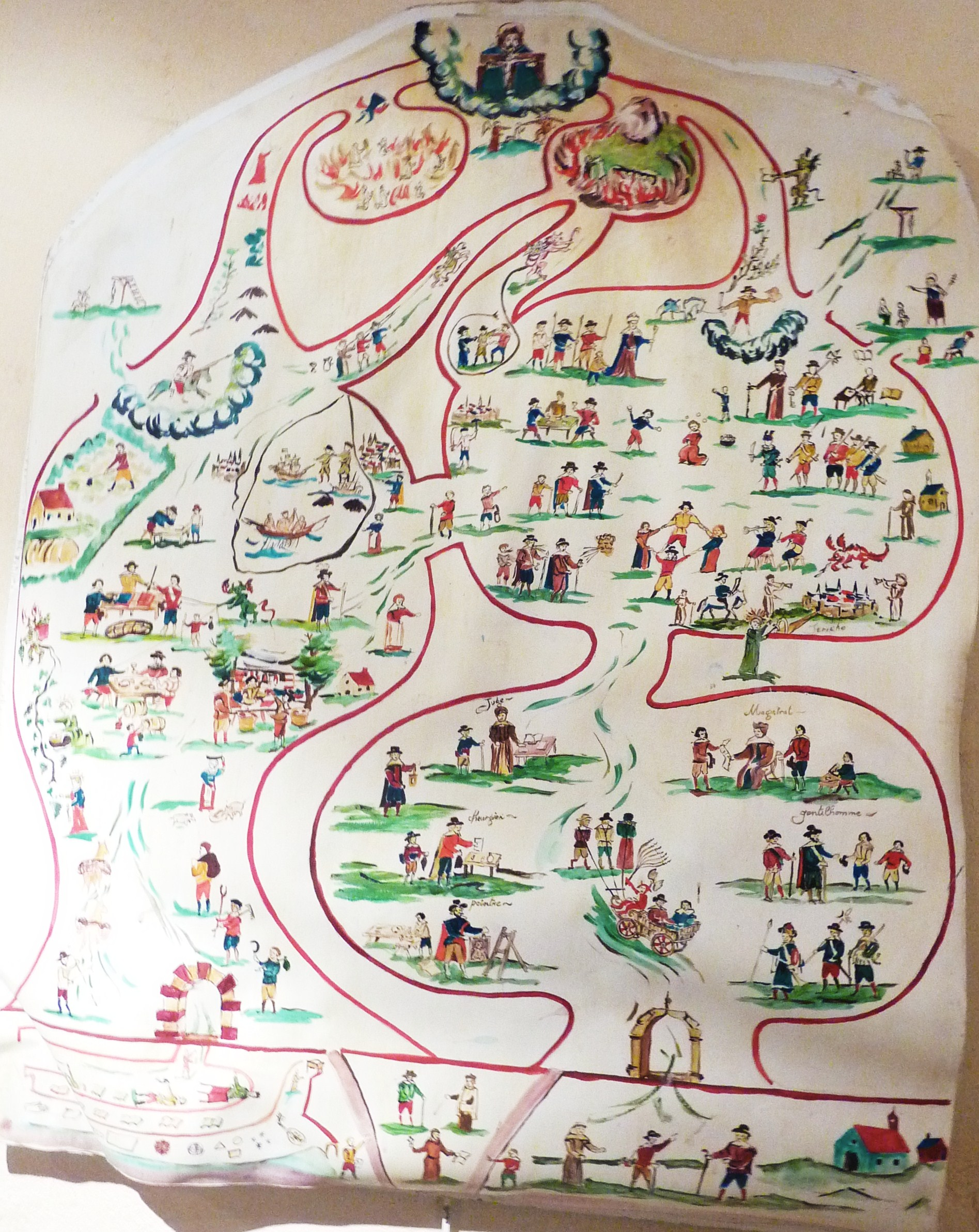 Tableau de mission utilisé par Michel Le Noblez : carte "le miroir du monde" (peint par Lestobec). A droite le chemin des puissants, à gauche le chemin des gens ordinaires, qui aboutissent tous les deux, en haut de la carte, au Jugement dernier où se tient Dieu le Père. Au passage deux écueils : l'Enfer (à droite) et le Purgatoire (à gauche) avant de gagner le Paradis.